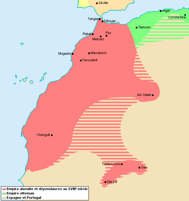 Extension maximale du Maroc sous la dynastie des Alaouites - XVIIIe siècle